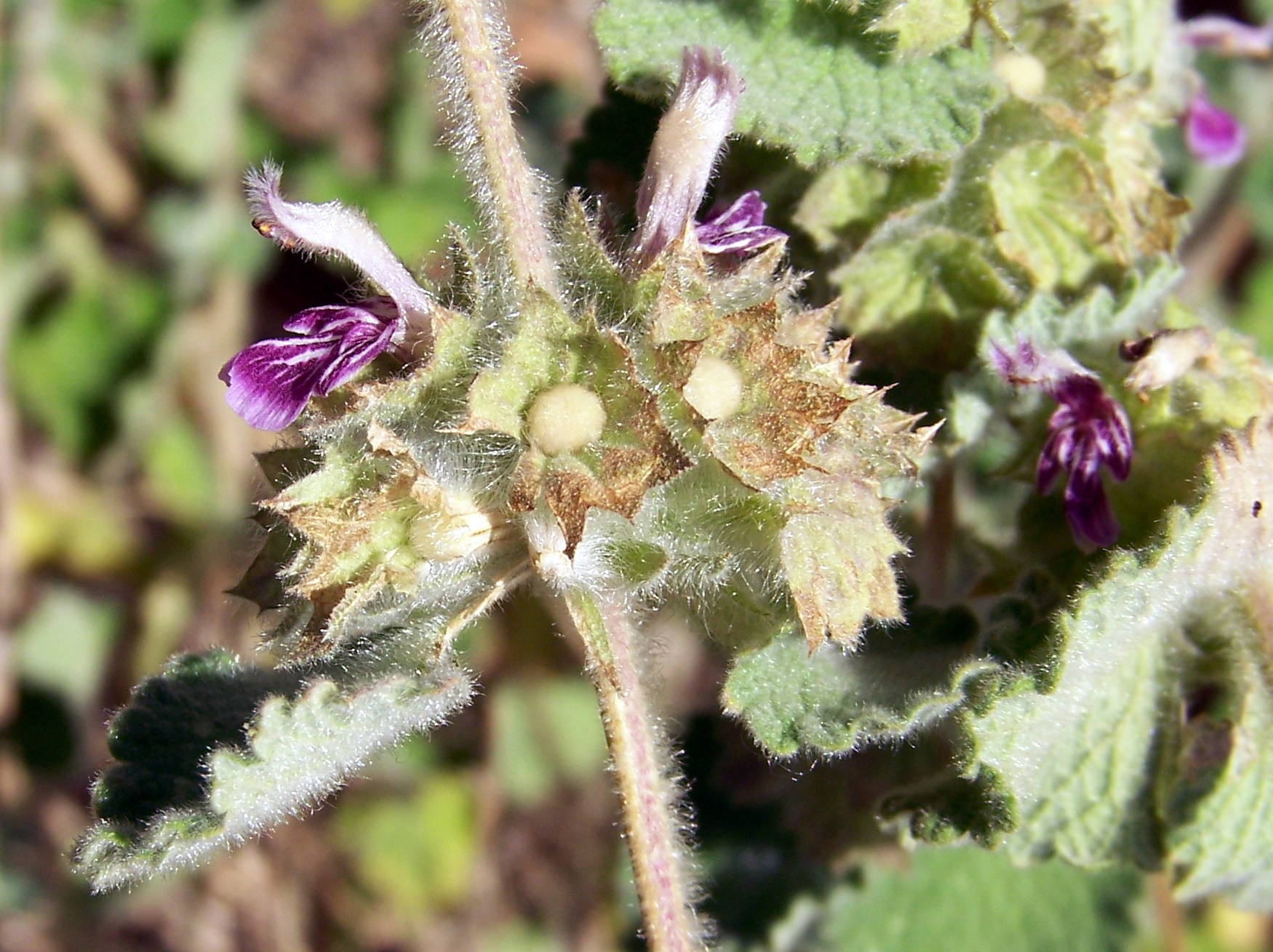 Ballota hirsuta (Manrrubio , Marrubio): Verticilo con flores y frutos incipientes rodeados por el caliz - Cabezo de las Fuentes/de los Ojales, Albatera (Alicante, España).